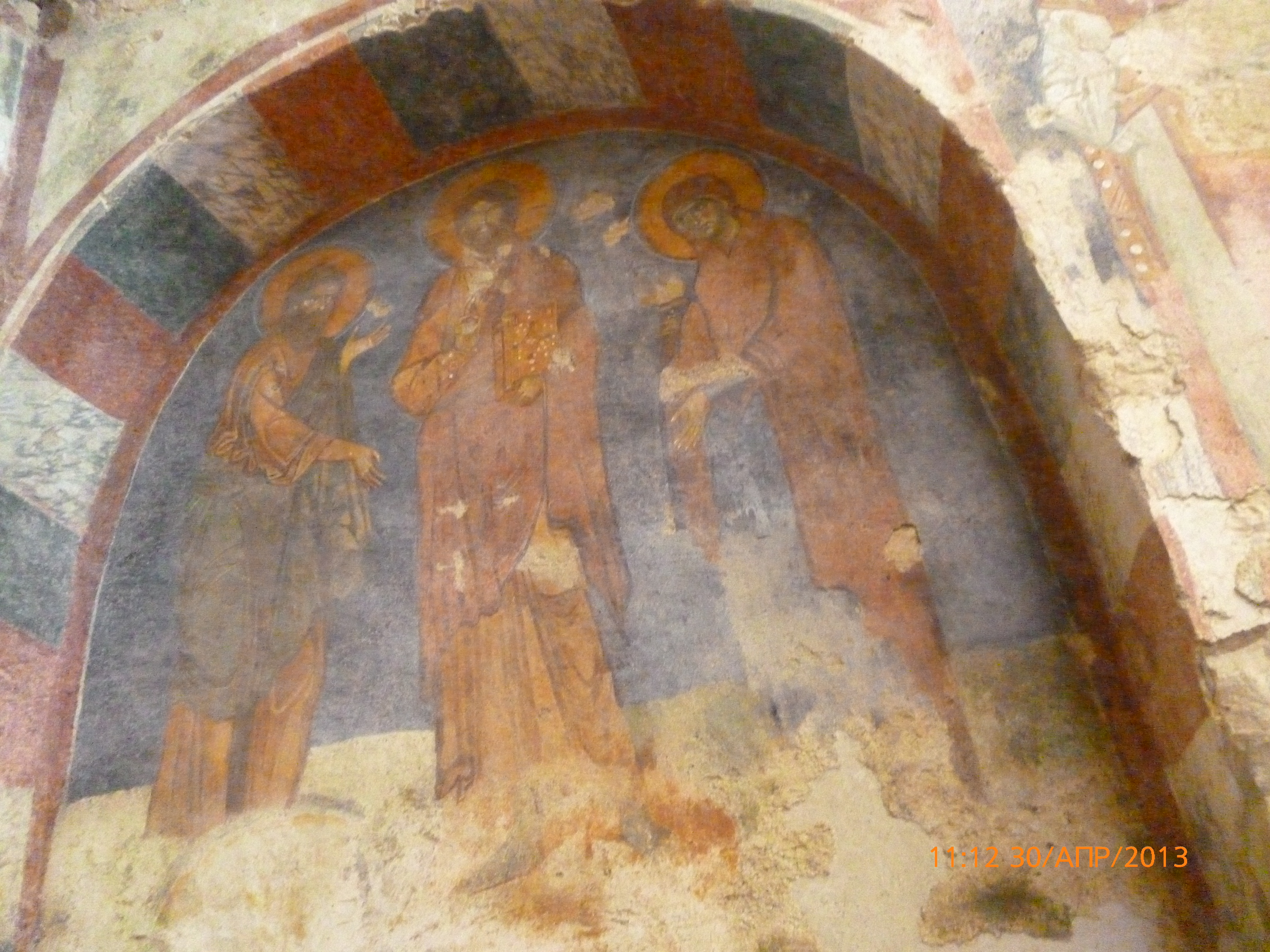 Внутриние убранство церкви Святого Николая в Демре